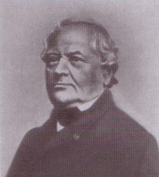 Porträtfotograie von Franz August Eichmann (1793-1879)